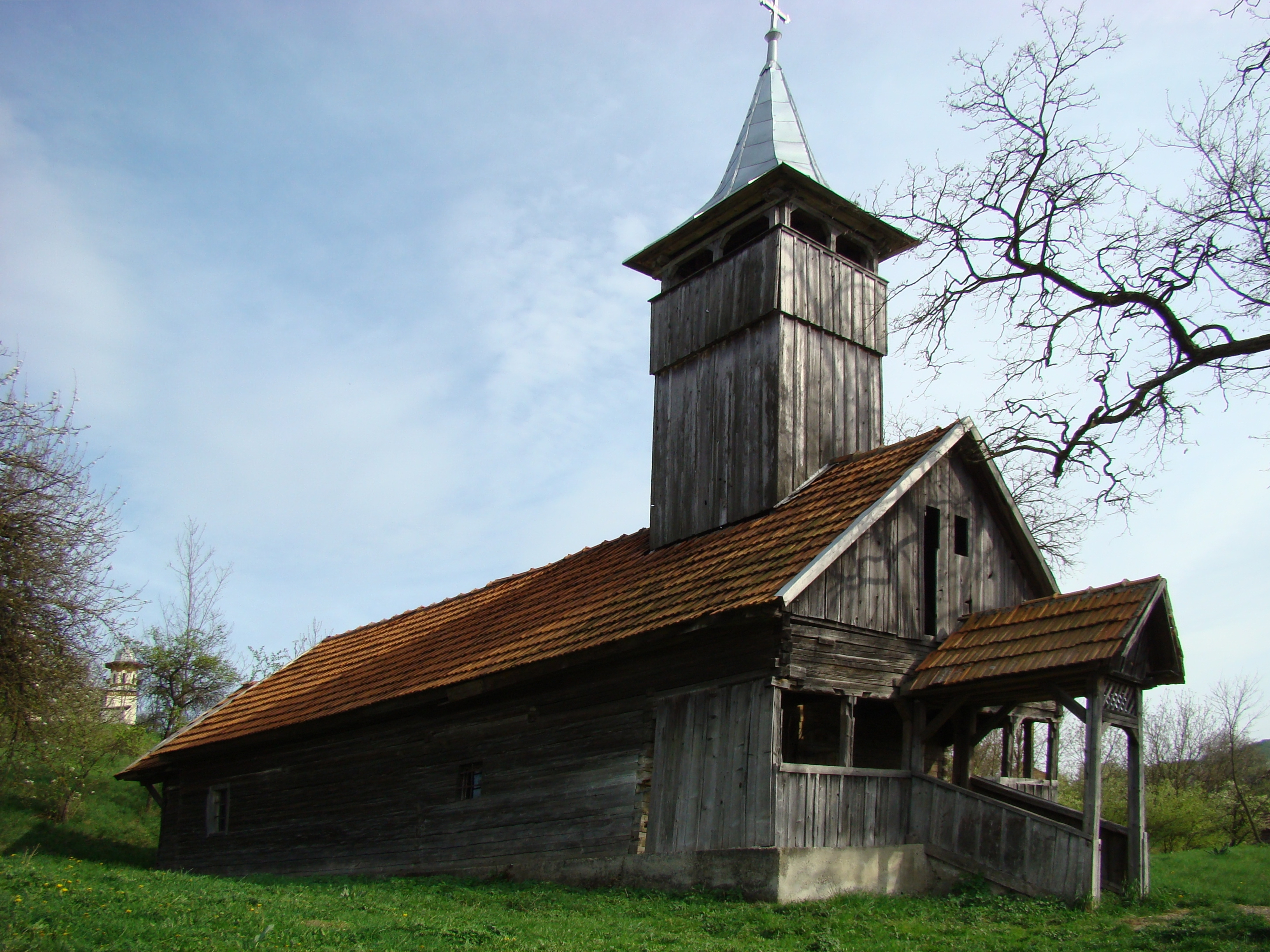 Die Holzkirche Sfinții Arhangheli Mihail și Gavriil von Noșlac, Kreis Alba in Rumänien